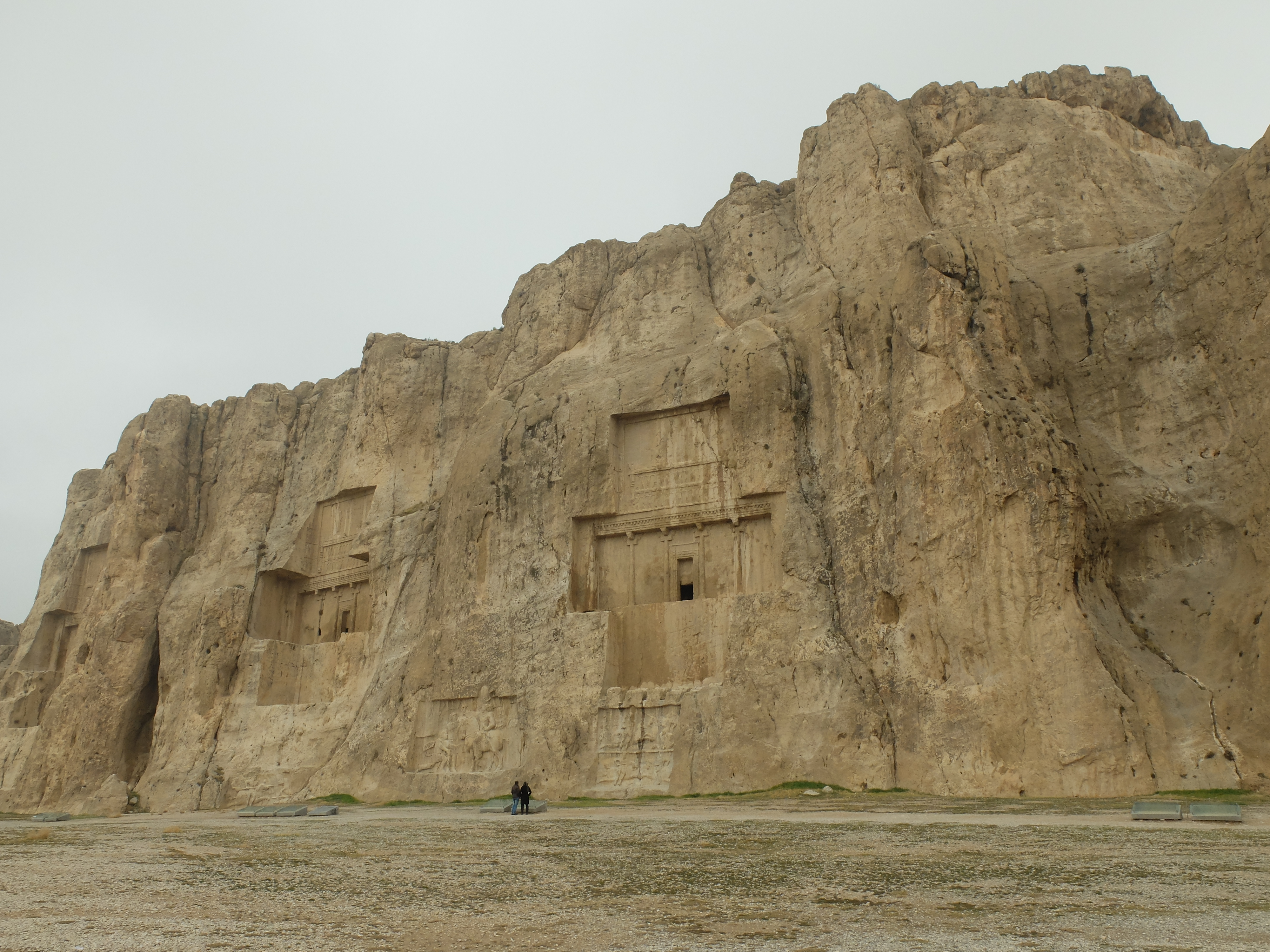 Naqsh-e Rostam